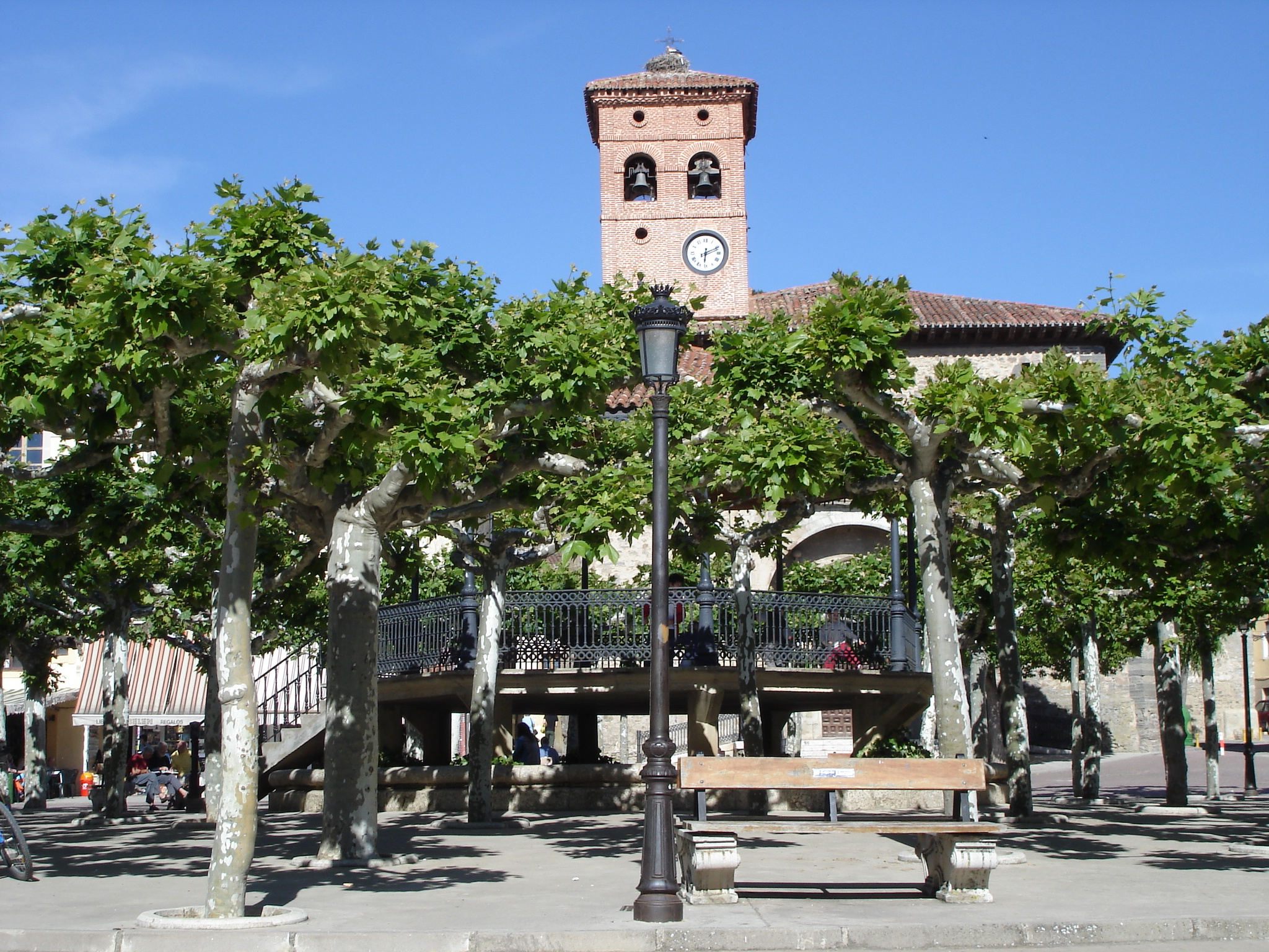 Plaza Mayor de Belorado, Castilla y León